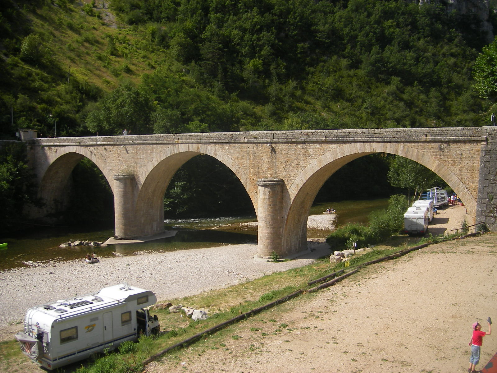 Bridge on Tarn, La Malène